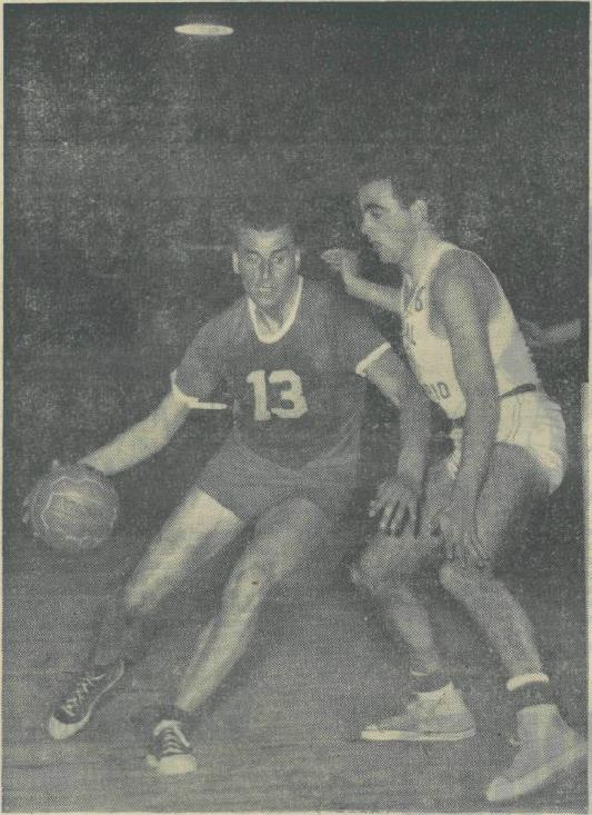 Ivo Daneu (na levi) na tekmi proti Real Madridu.